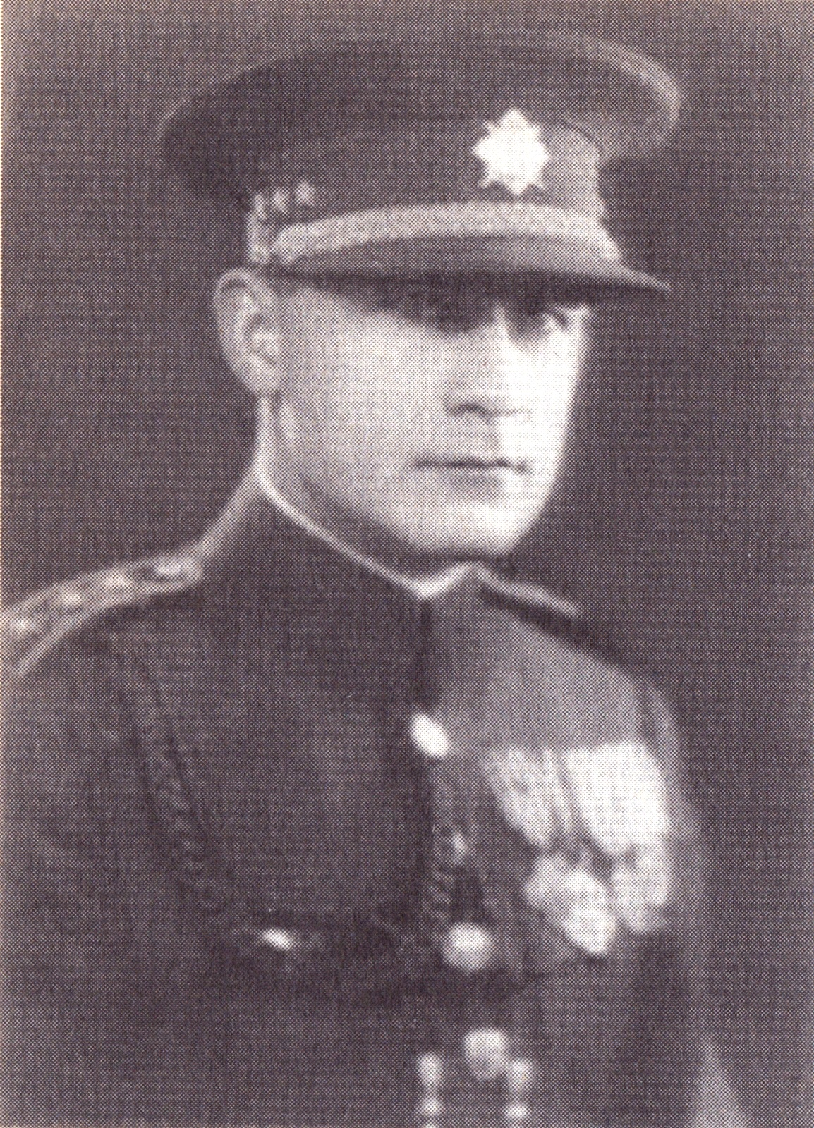 Josef Pták (* 1894, Luby u Klatov - 1945 v KT Flossenburg) byl příslušníkem českoslovesnkých legií v Itálii. Po skončení první světové války a návratu do vlasti pokračoval ve vojenské kariéře až do 15. března 1939. Do práce ve vrcholných orgánech vojenské ilegální organizace Obrana národa (ON) se Josef Pták zapojil prakticky ihned od dubna 1939 pod velením generála Josefa Bílého (první garnitura ON). Po svém zatčení v polovině prosince 1939 byl vězněn až do začátku dubna 1945. Konce druhé světové války se ale nedožil. Zemřel na následky vyčerpání po týdenním pochodu smrti do koncentračního tábora ve Flossenbürgu.